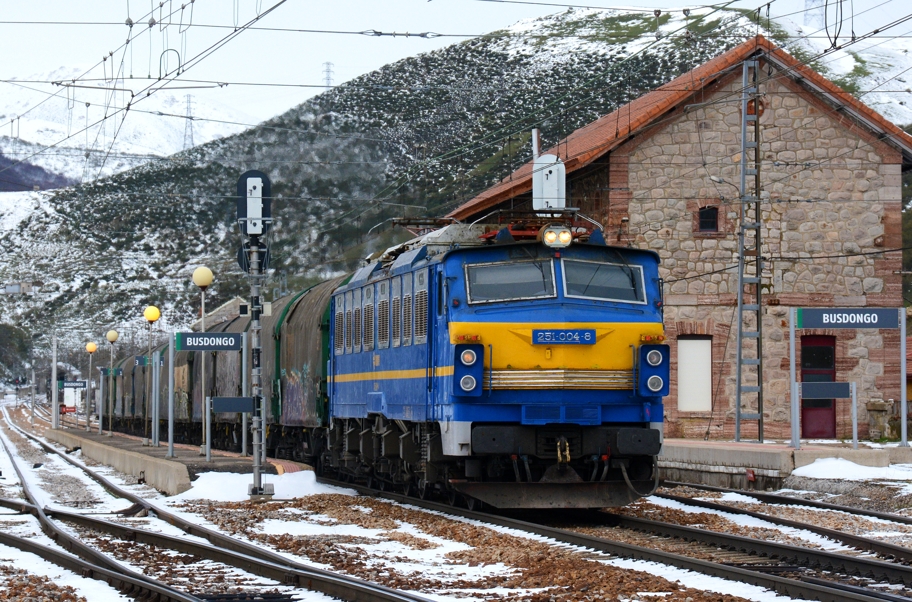 La locomotora 251.004 de Renfe, con un mercancías siderúrgico, en la estación de Busdongo (Villamanín, provincia de León, Castilla y León).